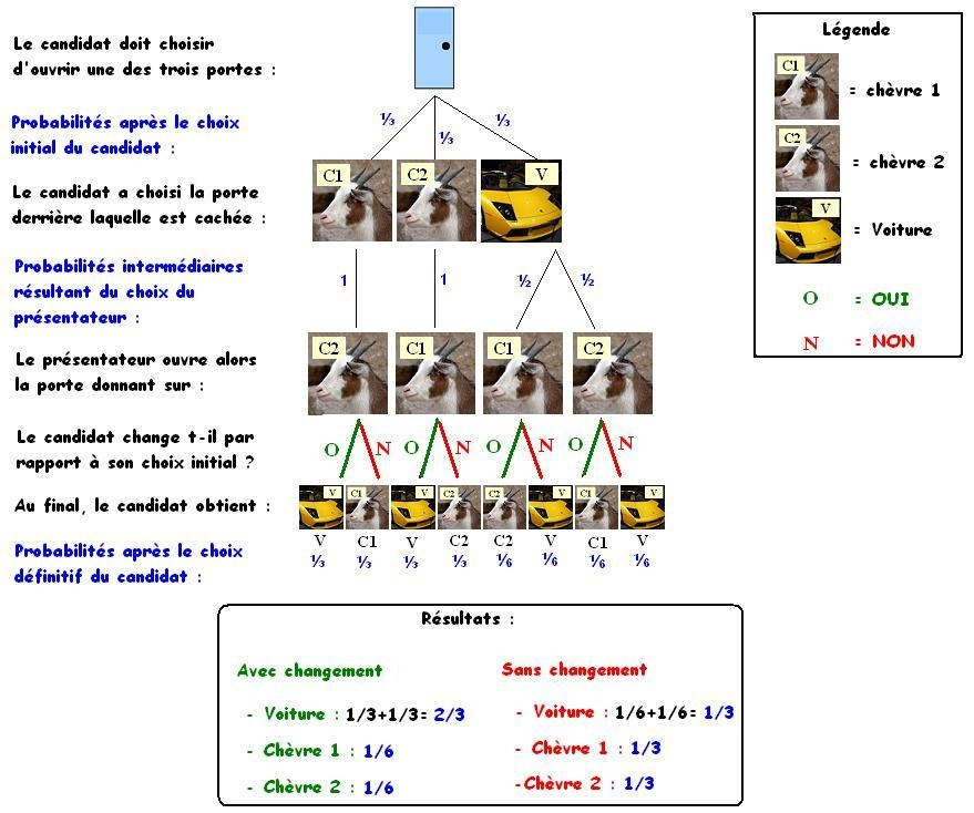 Arbre des possibilités du problème de Monty Hall Les images de la chèvre, de la voiture et de la porte sont soit dans le domaine public, soit sous licence GFDL. La chèvre est issue de wikicommons : La voiture vient d'une photographie personnelle prise en 2004 au salon de l'automobile à Paris. Les portes sont issues du wikipédia anglais : Le résultat final est un montage personnel inspiré de : mais traduit en français et adapté (par Kuxu